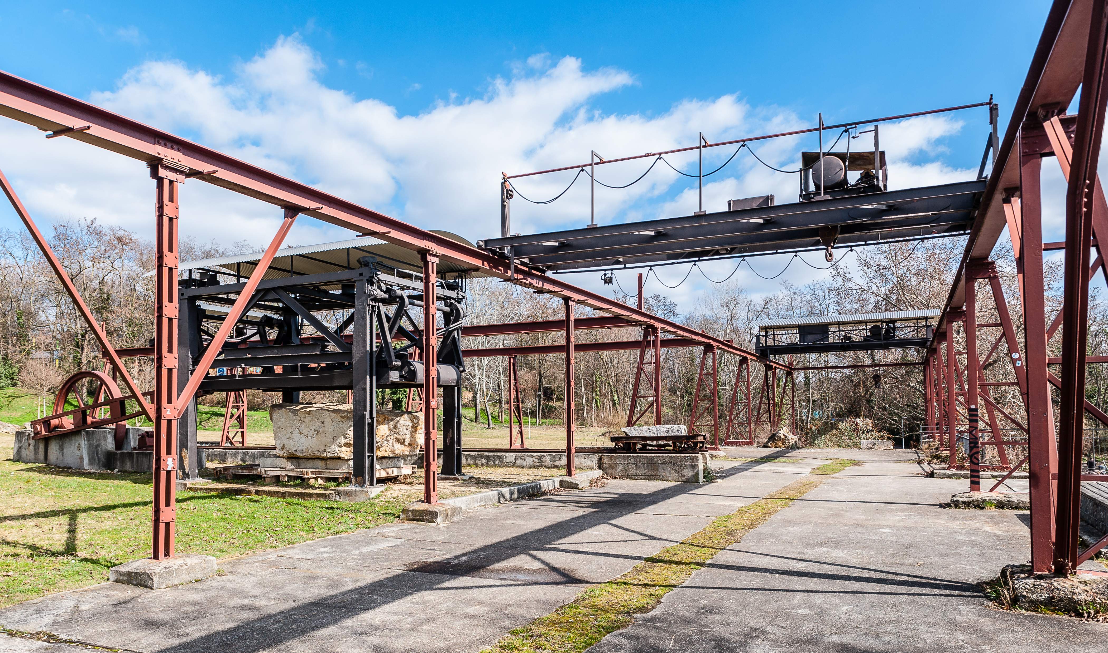 Historische Geräte der Firma Schauffele im Travertinpark Stuttgart